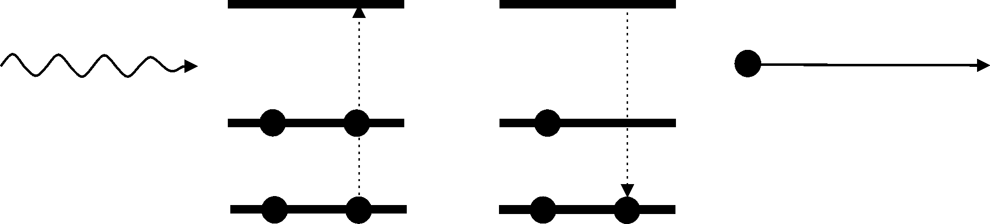 Shematski prikaz Augeovog efekta.